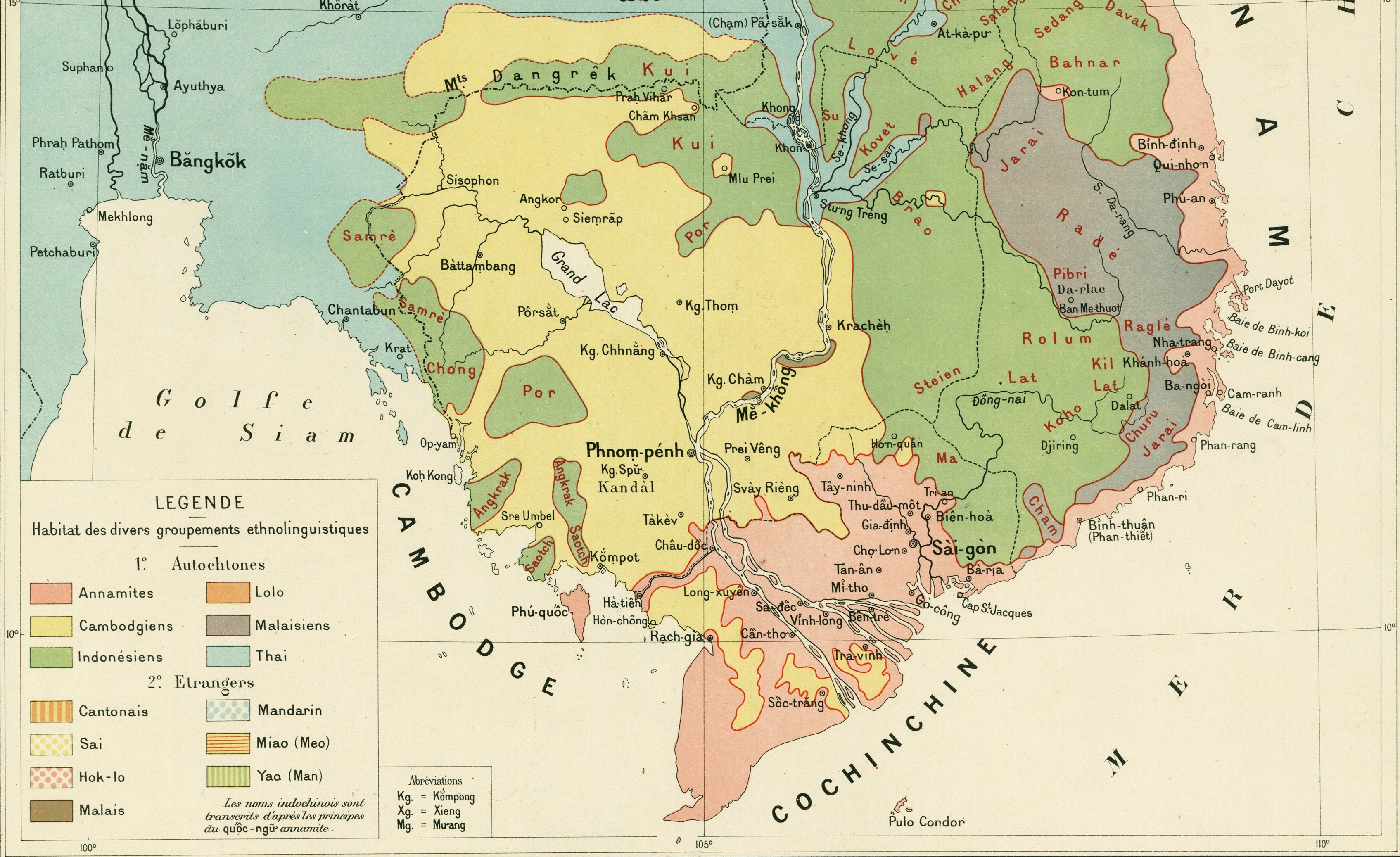 Bản đồ phân vùng cư trú của các dân tộc (sắc tộc) tại Nam Kỳ thuộc Pháp (Cochinchine Française) và Cao Miên (Cambodge) năm 1904. Trích từ Bản đồ phân bố dân cư theo sắc tộc (dân tộc) trên bán đảo Đông Dương năm 1904.